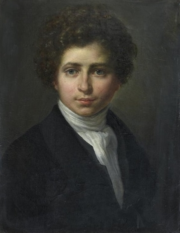 François-Gabriel Lépaulle, Autoportrait, huile sur toile, 35 x 27 cm. (13.8 x 10.6 in.). Localisation inconnue.